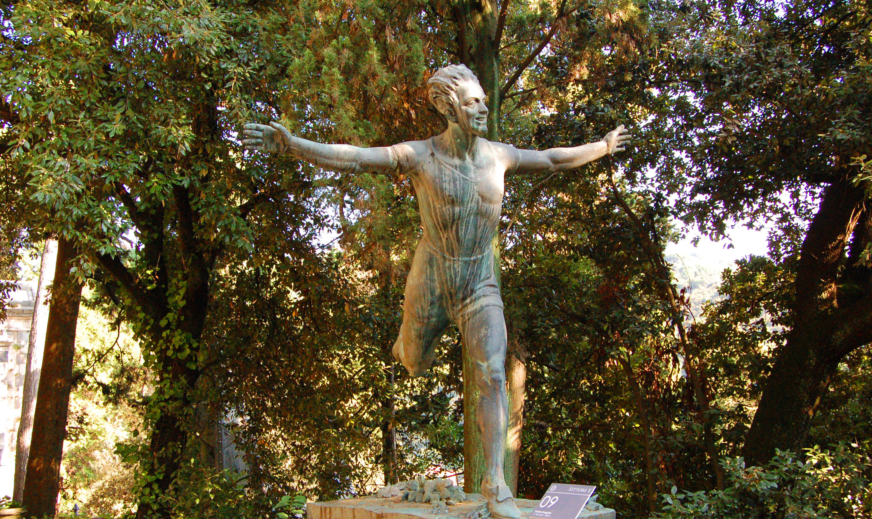 Tomba Alfredo Gargiullo, Cimitero monumentale di Staglieno Genoa This is a photo of a monument which is part of cultural heritage of Italy.